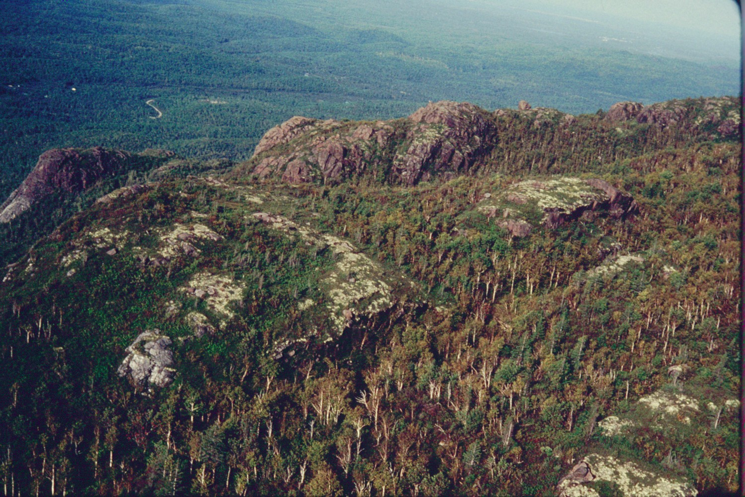 Haut sommet des monts Valin